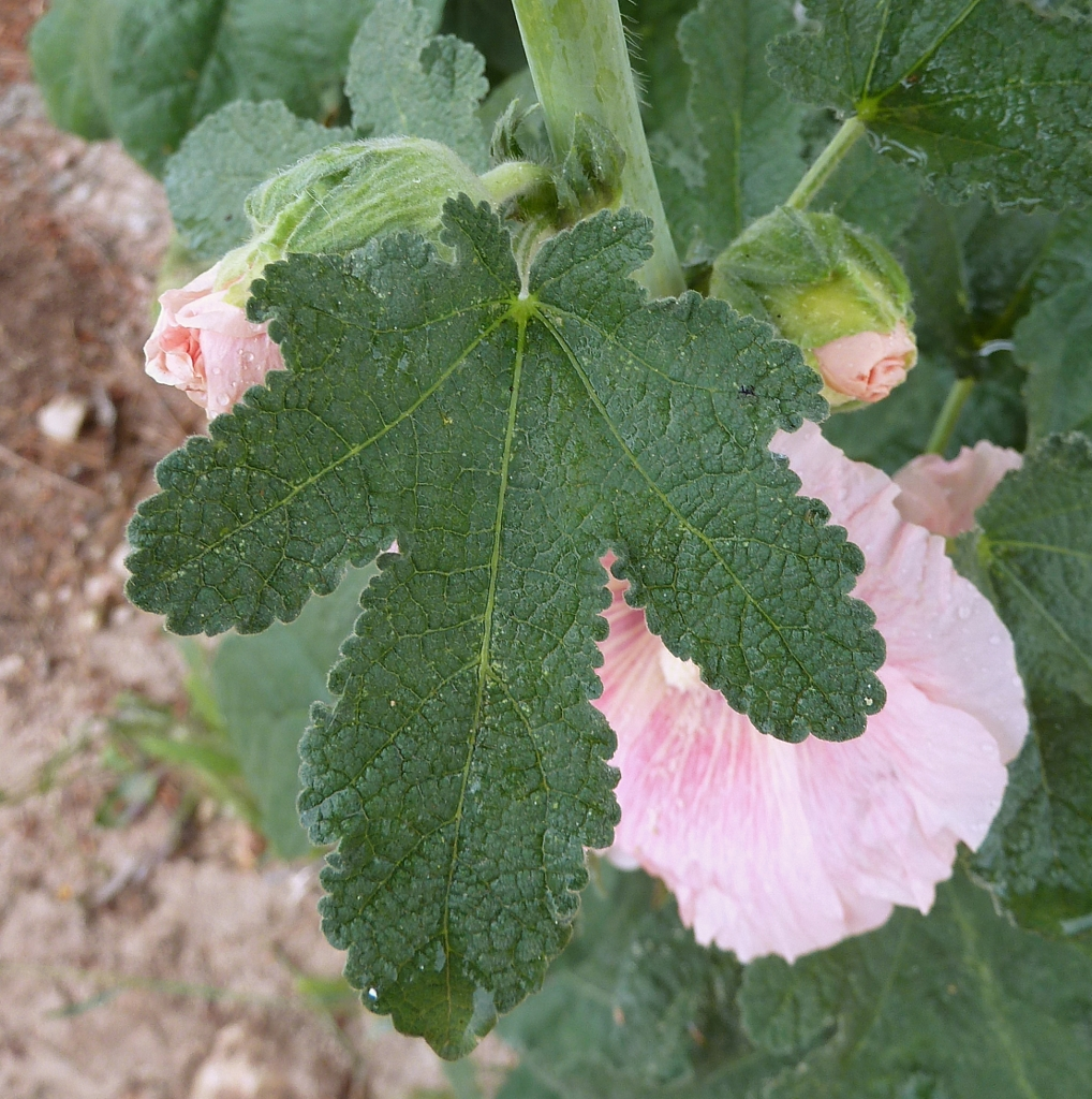 Alcea rosea (Malva real, Malva rosa, Malva loca): Hoja palmatilobada/partida - Cultivada/ornamental, Camino de San Cayetano, Albatera (Provincia de Alicante, España).